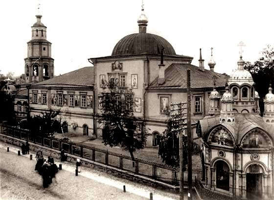 Церковь Сошествия Святого Духа в Суконной слободе города Казани.